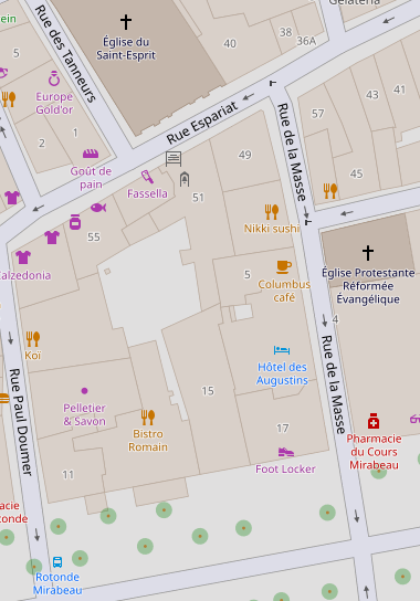 Plan du quartier des augustins - Aix-en-Provence (2019). Au Sud (en bas de l'image) le Cours Mirabeau. Au Nord, en face de la tour du clocher: l'église du Saint-Esprit. Au centre, l'ancien cloître du couvent des augustins.